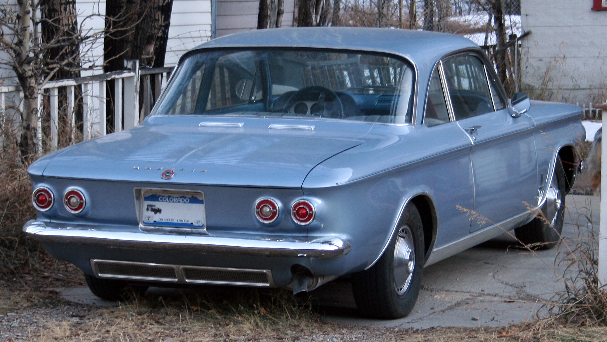 Chevrolet Corvair Monza Coupé